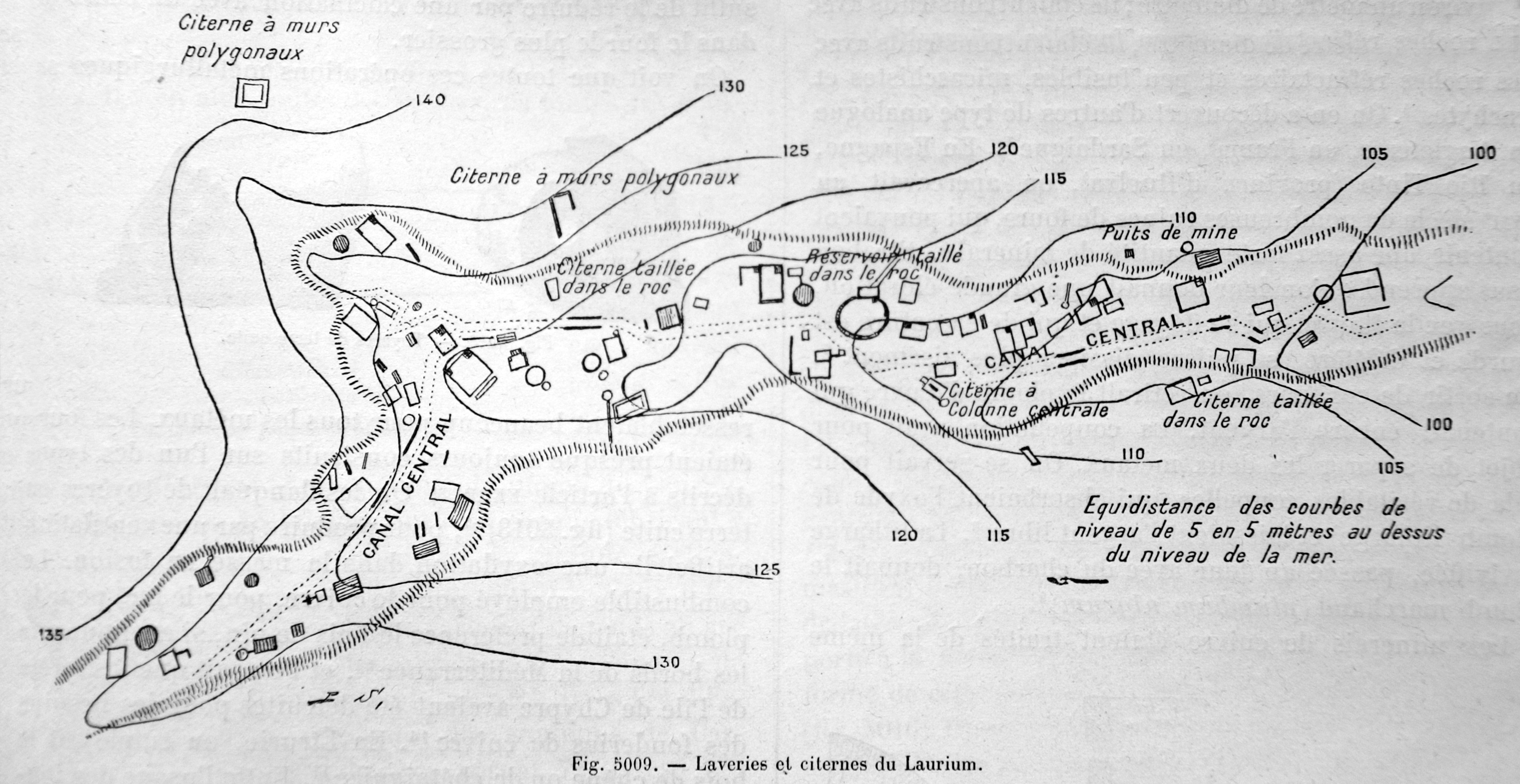 photographie d'une illustration de l'ouvrage libre de droit Charles Daremberg, Edmond Saglio Dictionnaire des antiquités grecques et romaines, tome 3, volume 2, Hachette, 1877-1914, p. 1863 ; Succession de citernes et d'aires de lavage dans une vallée du Laurion (Val Botzaris)